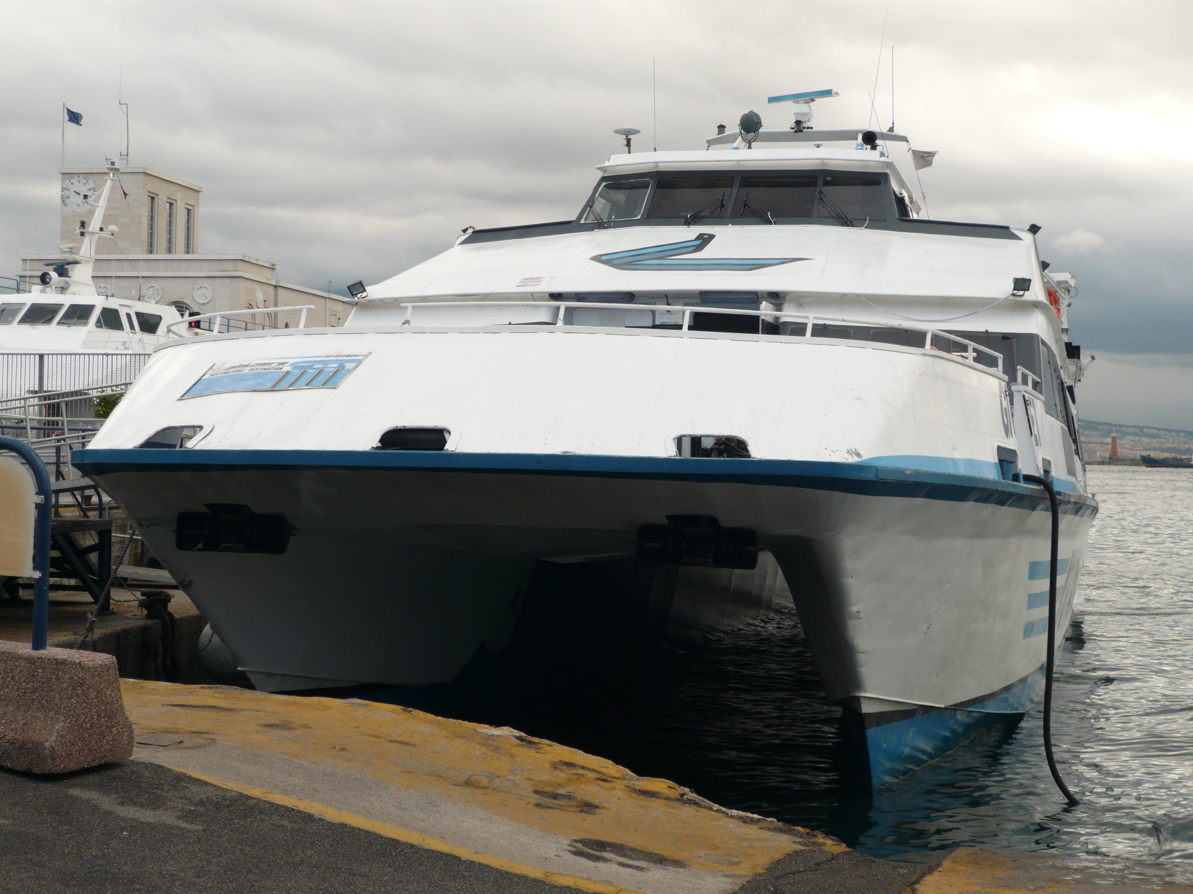 Katamaran Giove Jet fest gemacht an der Mole Beverello von Neapel. Dieser Bootestyp wird zusammen mit dem Tragflächenboot für Fährverbindungen zwischen der Hauptstadt und in den Golf-Inseln (Capri, Ischia und Procida) verwendet